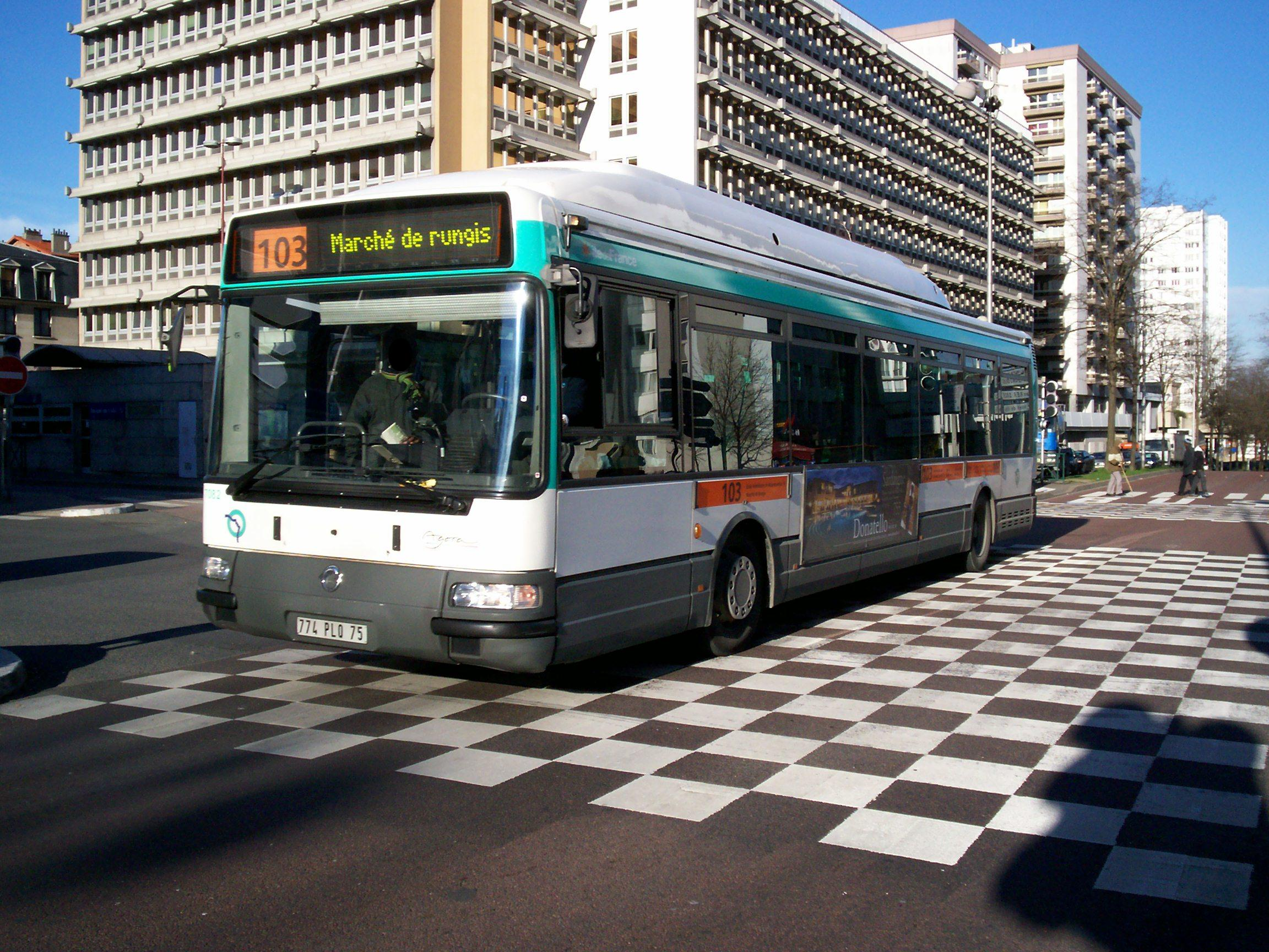 Bus 103 à Choisy-le-Roi Rouget de Lisle